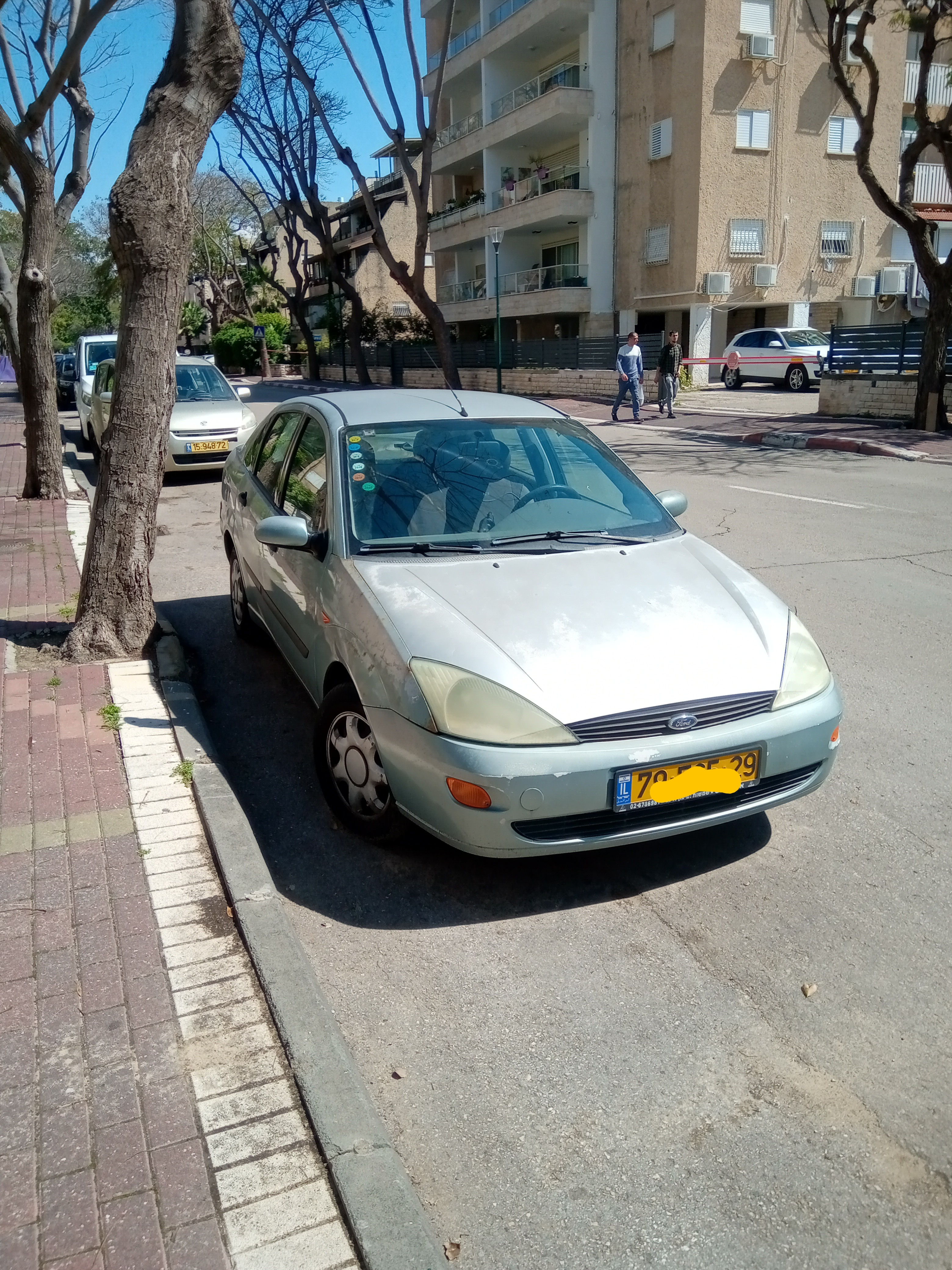 פורד פוקוס, שנת ייצור 2000